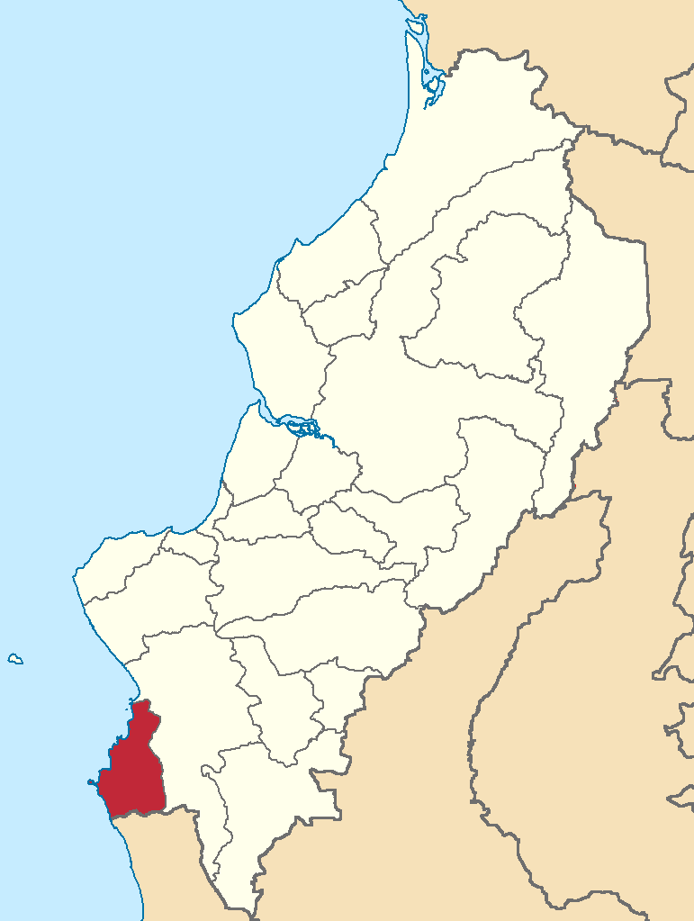 Mapa localizador del cantón en Manabí, Ecuador